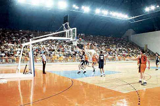 Хала Колашин